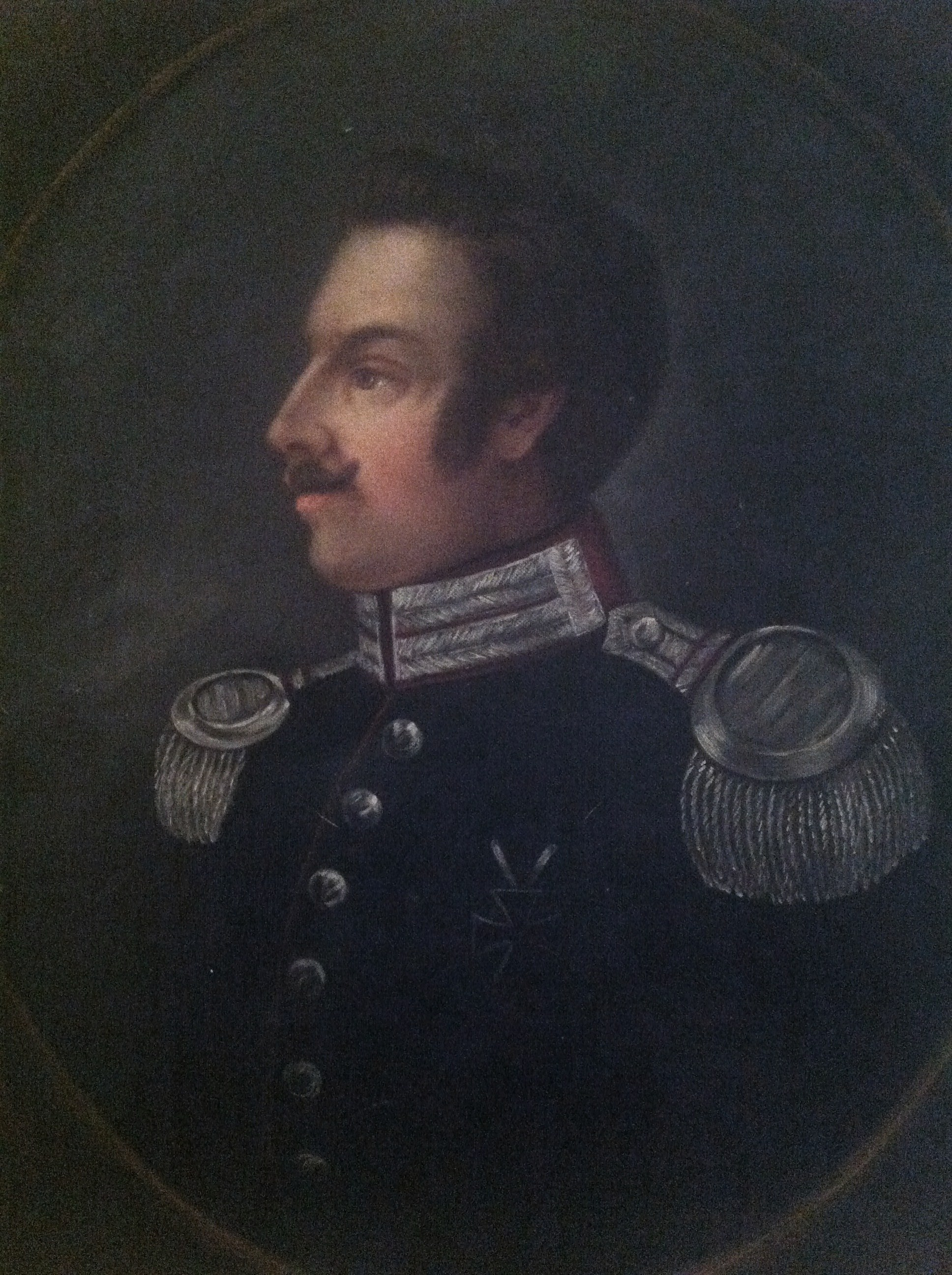 Photographie eines Ölbildes